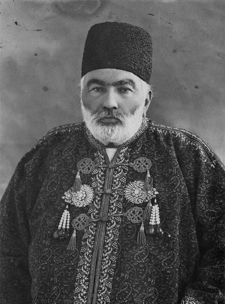 احمد مشیرالسلطنه چهارمین نخست وزیر ایران